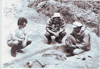 Фото 1985 р. Археологічні розкопки в Гірчаковому лісі. біля с. Медвин. Зліва на право- Василенко В.Я., Ільніцький О.О., Левченко Б.М..